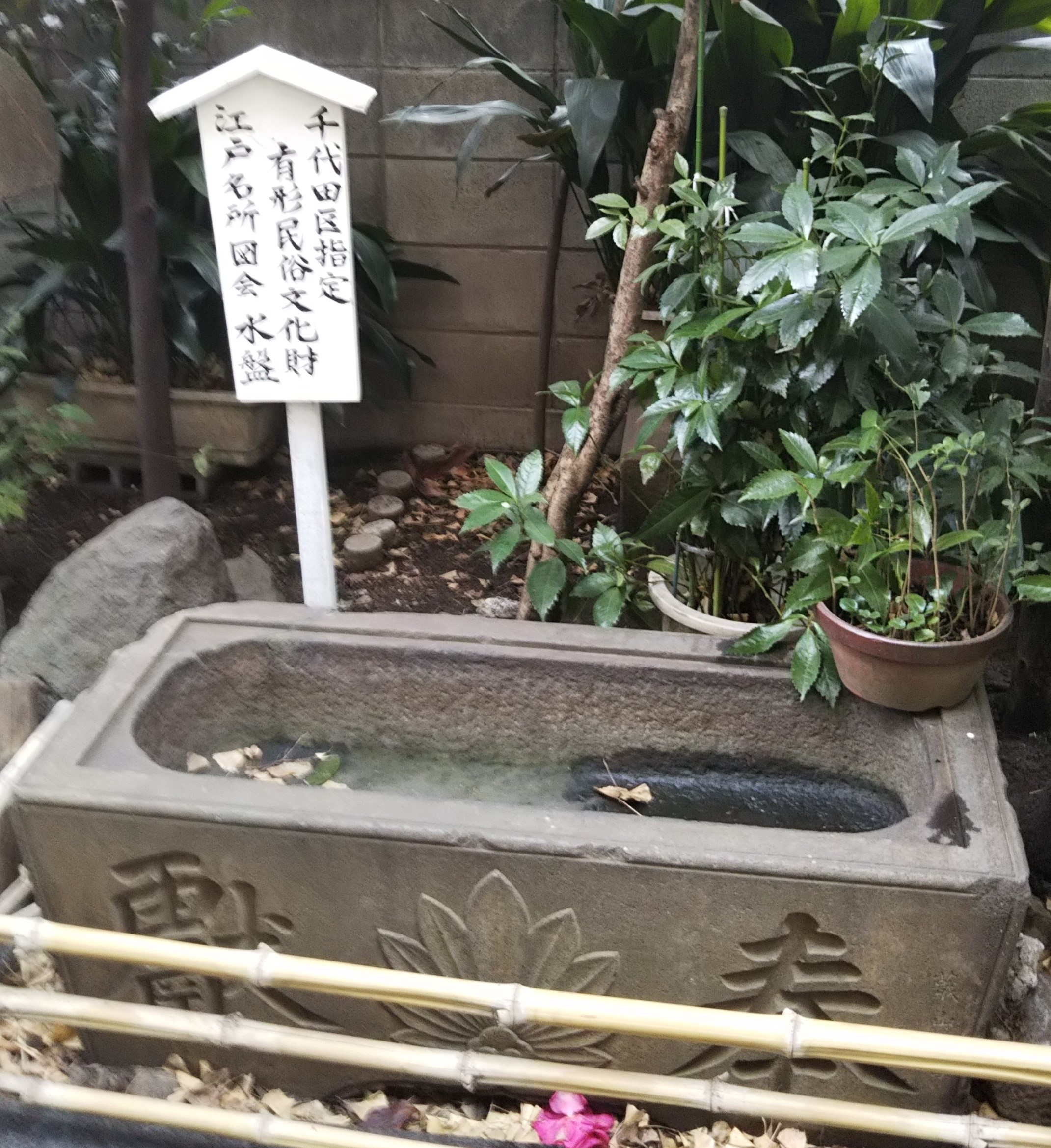 東京都千代田区の三崎稲荷神社にある水盤です。千代田区文化財に指定されています。2020年2月15日撮影。